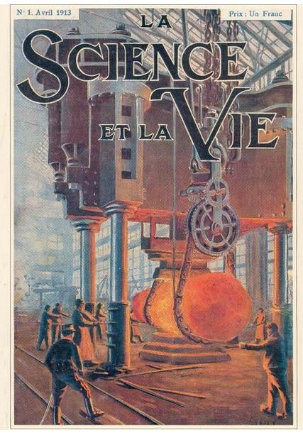 Couverture du n°1 de La Science et la Vie, Paris, 1er avril 1913. Sujet de la une : industries d'aciérie et de fonderie.